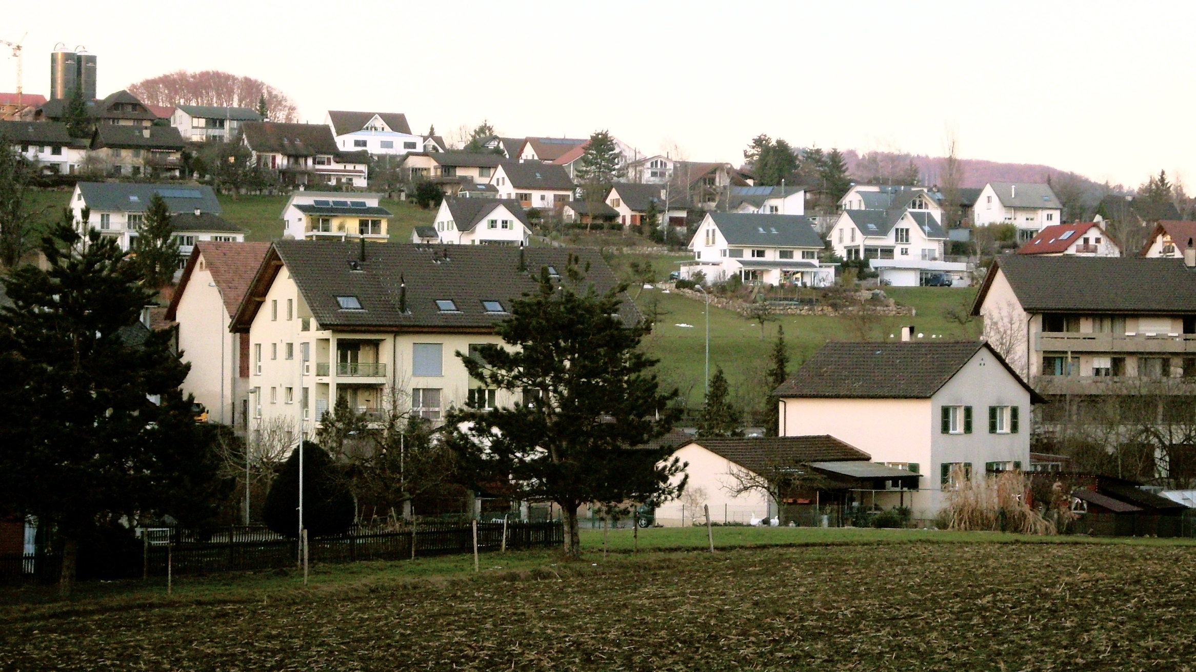 Teilansicht von Ormalingen, Schweiz